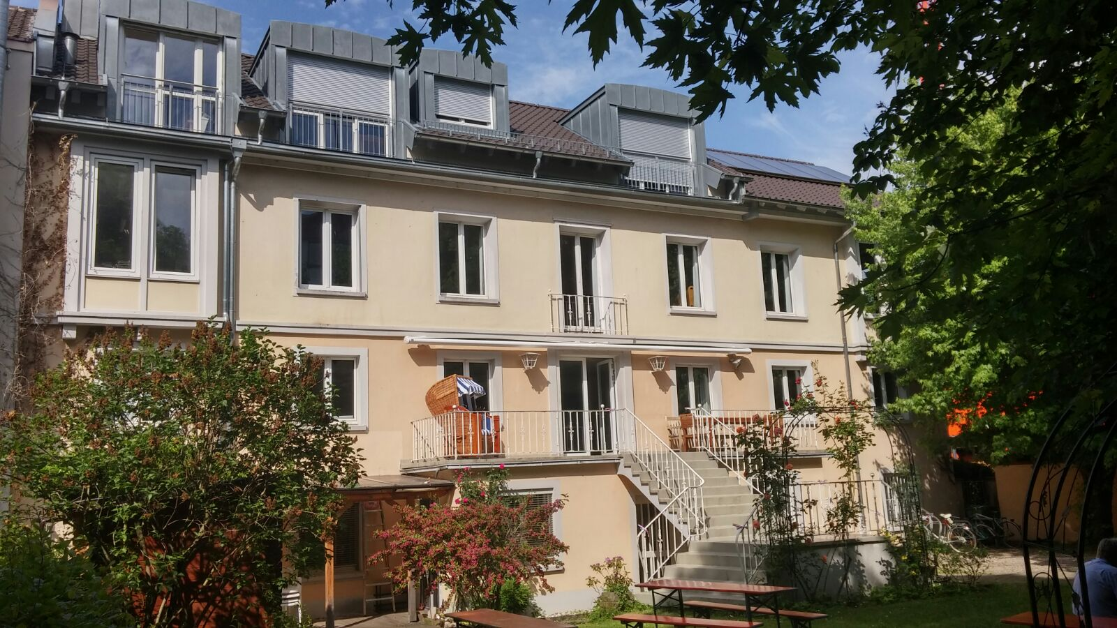 Rhenanen-Haus Albertstraße 32